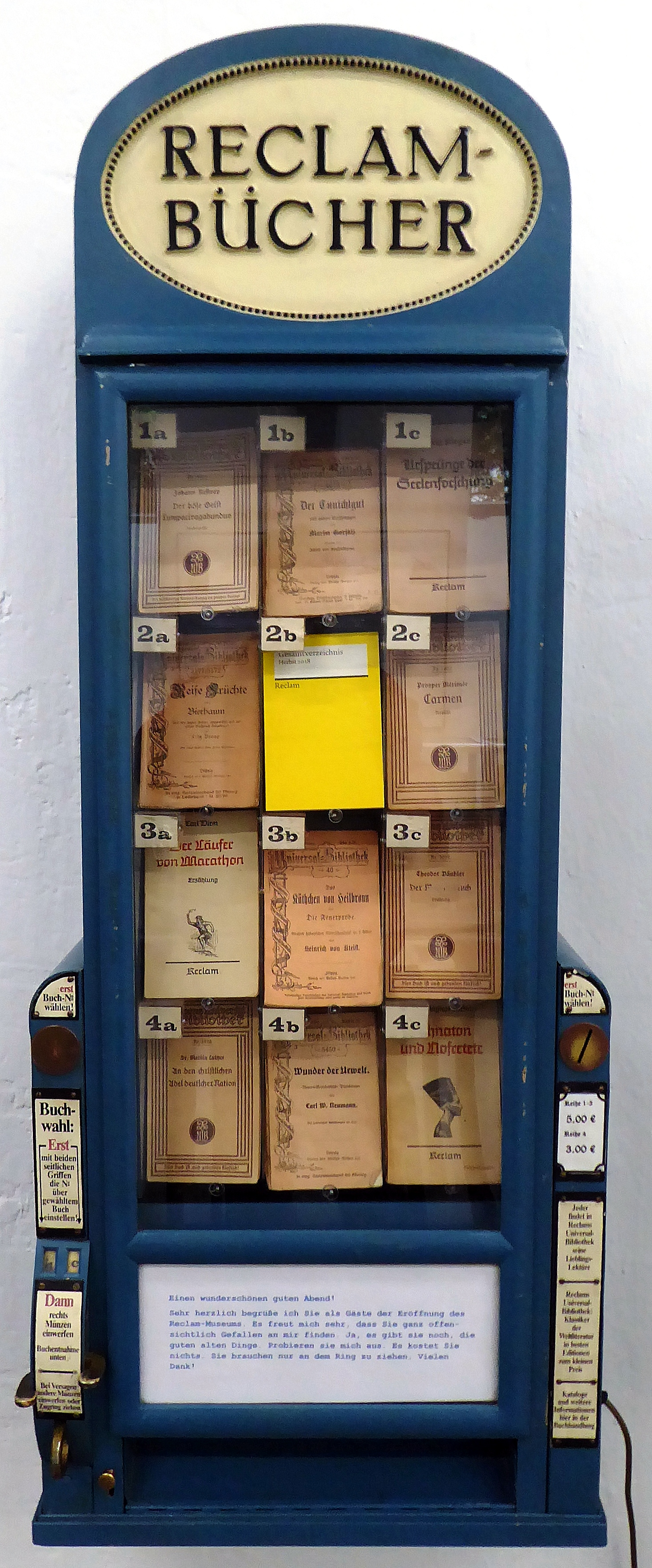 Reclam-Museum, Leipzig: Nachbau des Reclam-Bücherautomaten von 1912. Dauerleihgabe des Reclam-Verlages in Stuttgart.